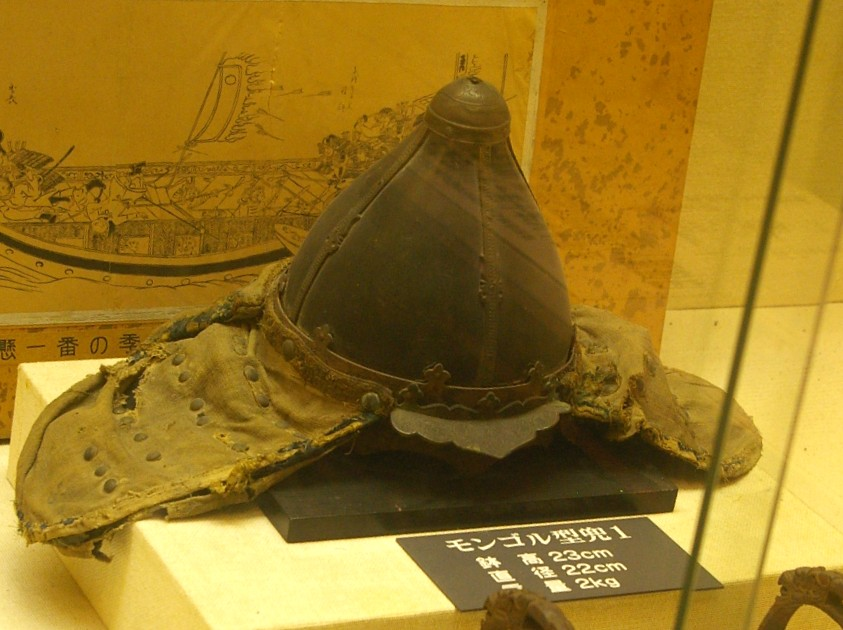 GFDL 2008